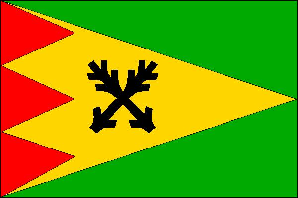 Vlajka obce Oudoleň